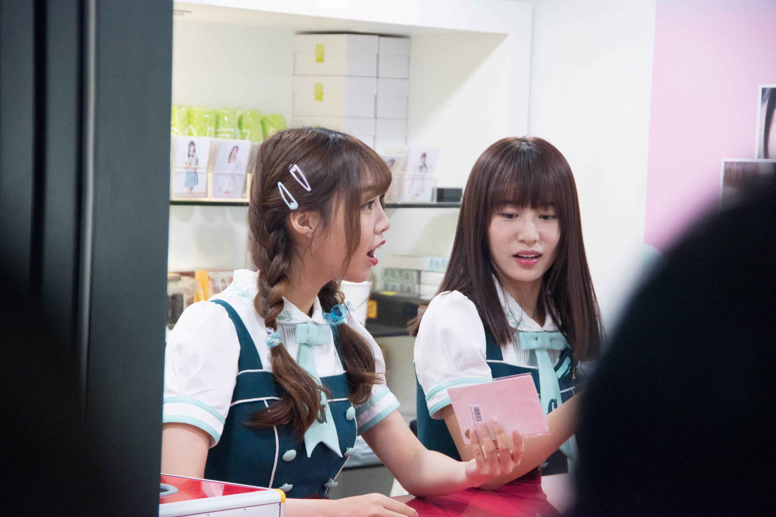 20171002——一日店员服务（张琼予、陈珂）